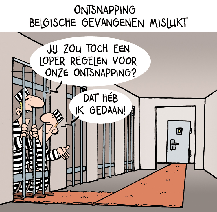 Cartoon van cartoonist René Leisink verschijnend onder de naam Argus